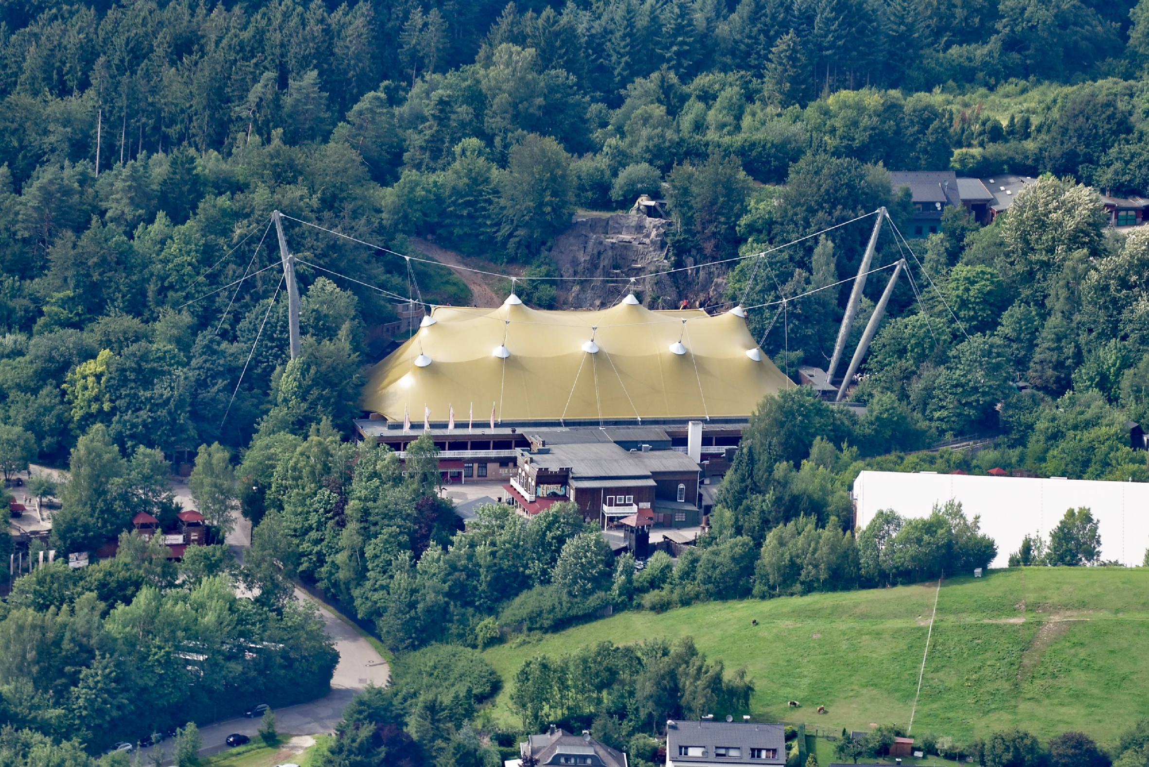 Luftaufnahme: Elspe Festival, Nordrhein-Westfalen